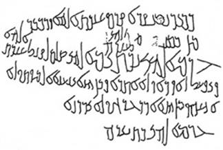 أثر-نقش-عين-عبدات